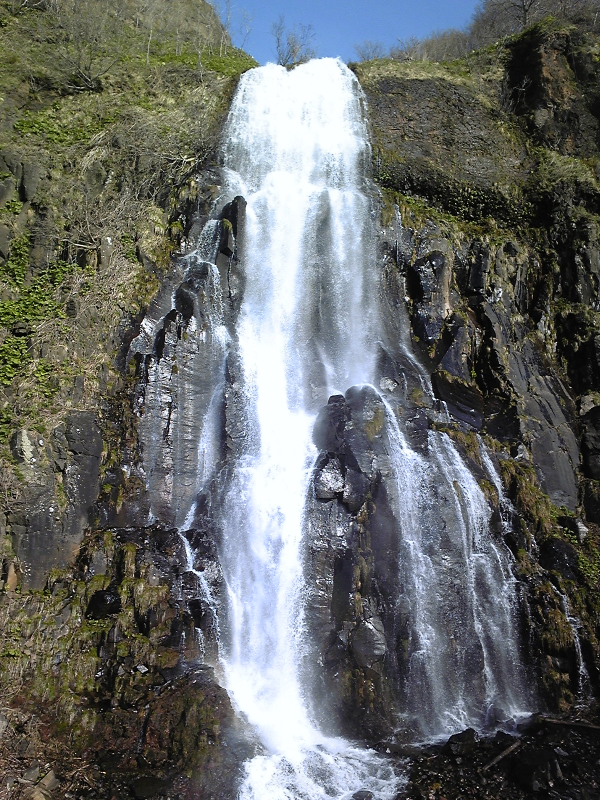 北海道石狩市の白銀の滝 (Shiragane Falls)